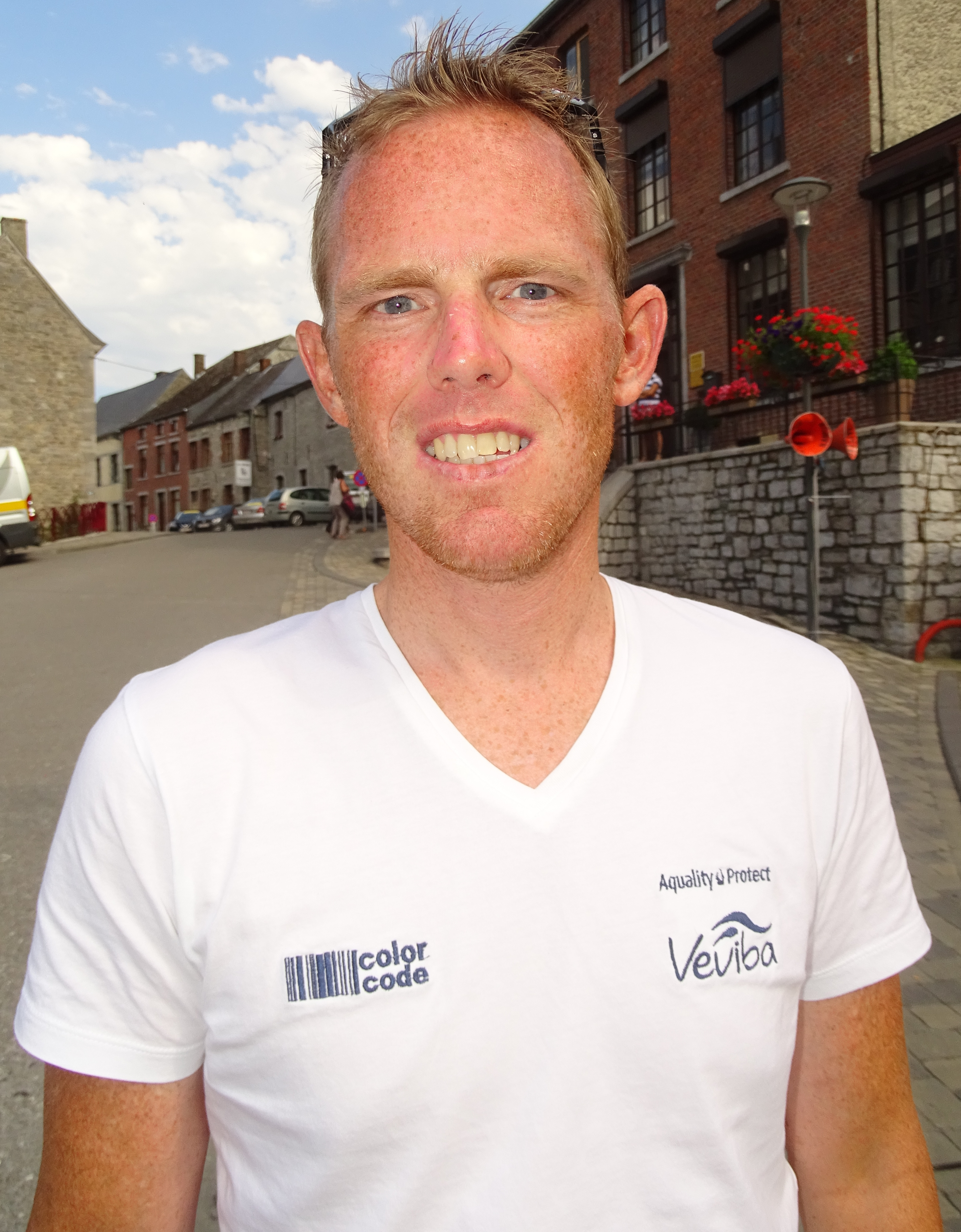 Reportage réalisé le vendredi 7 août à l'occasion de l'arrivée de la troisième étape du Tour de la province de Namur 2015 à Walcourt, Belgique.